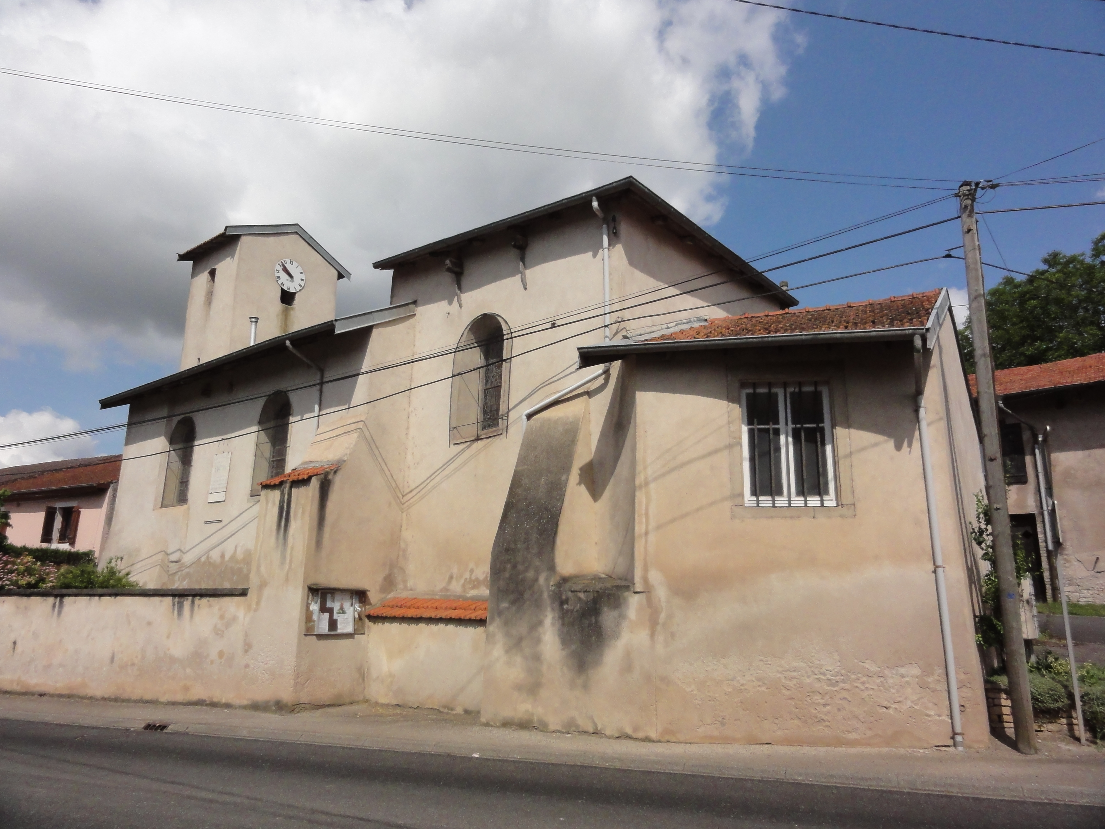 Saint-Mard (M-et-M) église